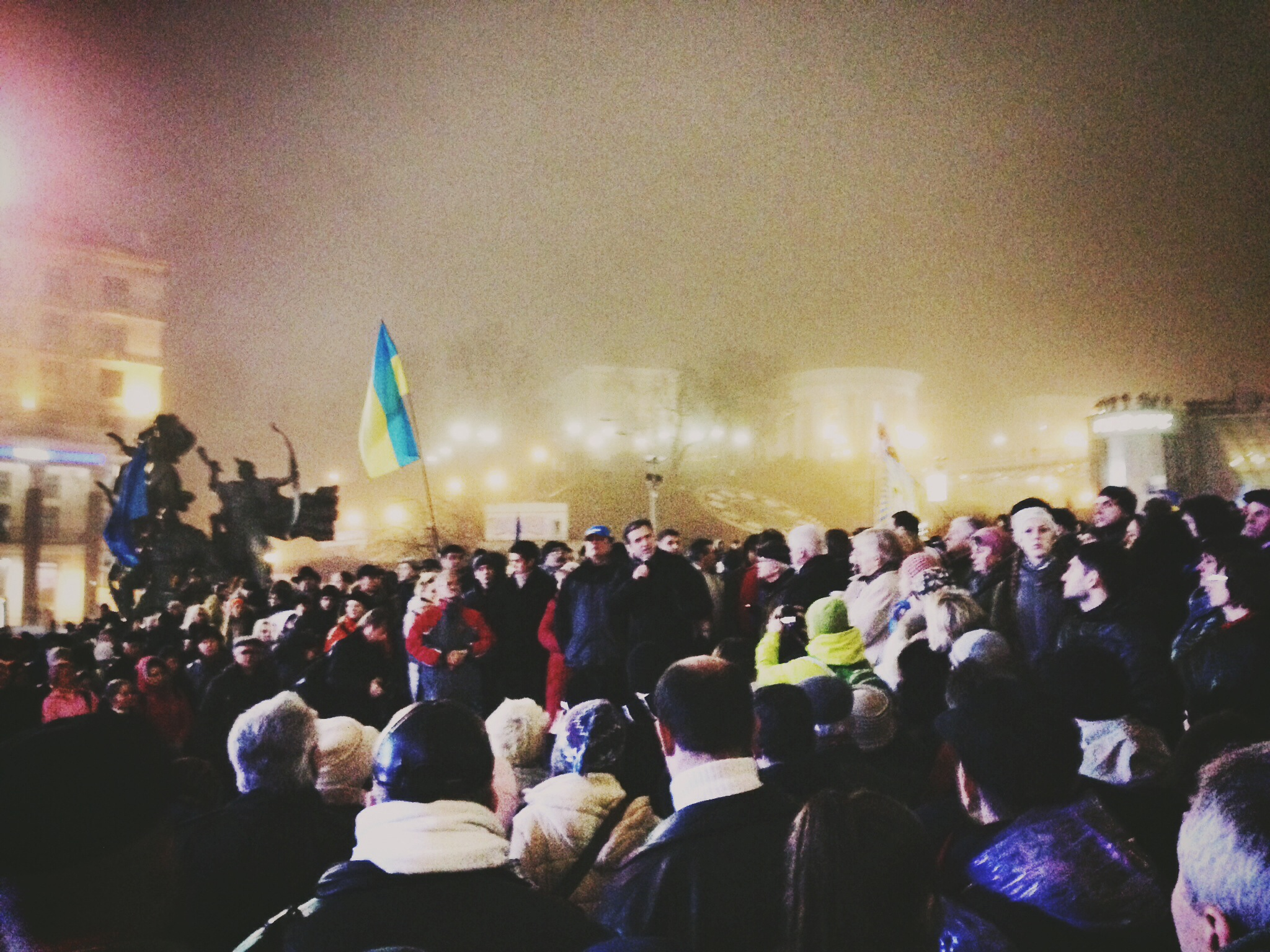 Pavlo Sheremeta on Euromaidan